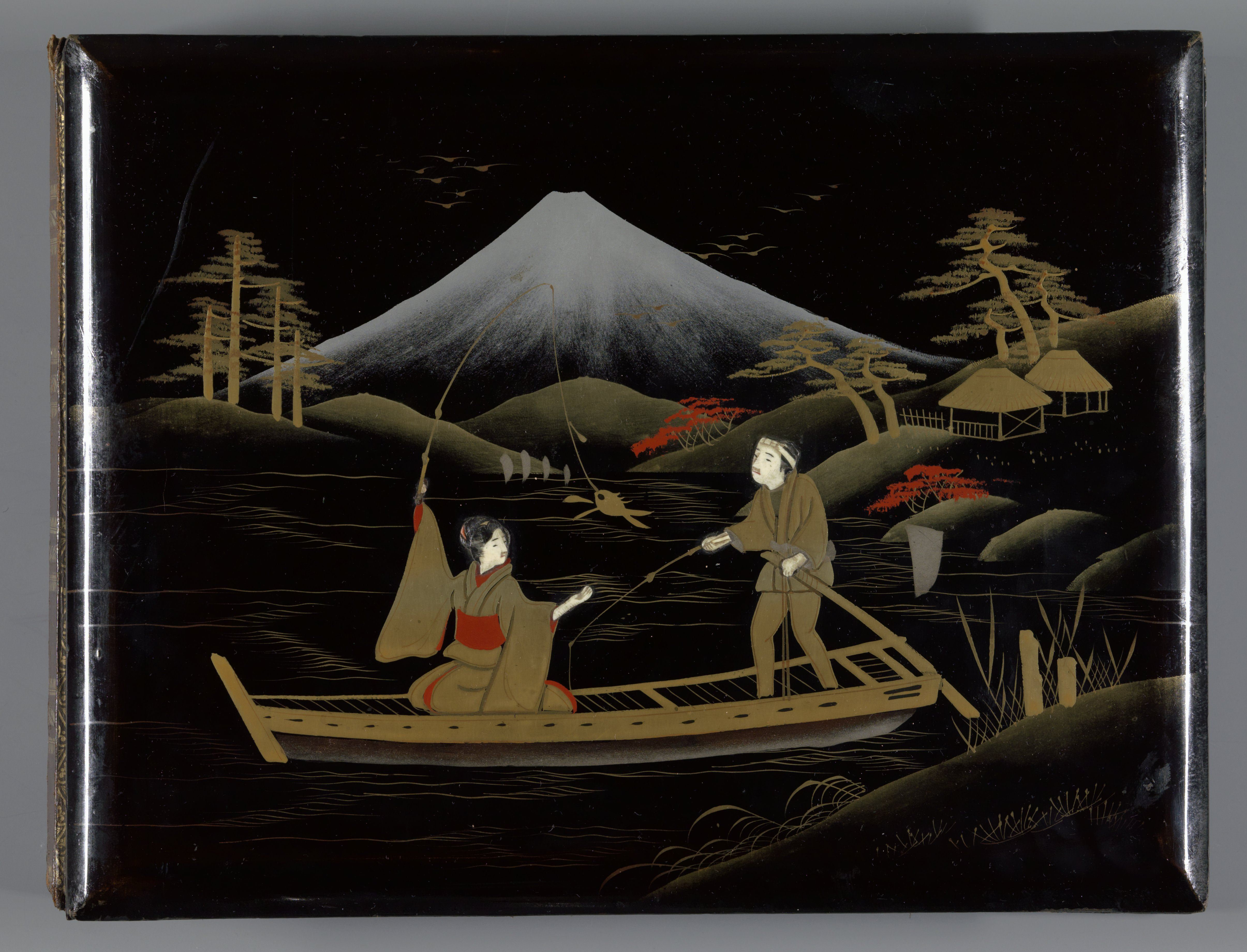 IdentificatieTitel(s): Fotoalbum (leeg)Objecttype: fotoalbum insteek-album Objectnummer: RP-F-F01205Omschrijving: Fotoalbum in leren band met twee lakpanelen. Op het voorpaneel een man en een vrouw in een boot voor de berg Fuji, hun gezichten en handen in reliëf van ivoor. Het achterpaneel is effen zwart. Het album bevat negen kartonnen bladen overtrokken met zijde. Elke pagina heeft uitsparingen voor kabinetfoto's en cartes-de-visite. Daaromheen zijn geschilderde versieringen aangebracht: bloemen, vogels en landschappen.VervaardigingVervaardiger: vervaardiger: anoniemDatering: ca. 1860 - ca. 1900Fysieke kenmerken: fotoalbum in band van leer met lakpanelen ingelegd met ivoor en parelmoerMateriaal: lak hout leer ivoor parelmoer zijde textiel karton papier dekverf waterverf Techniek: boekbinden / penseelOnderwerpWat: bookrowing-boat, canoe, etc.adult womanadult manmountain-top, peak (+ landscape with figures, staffage)Waar: FujiVerwerving en rechtenVerwerving: overdracht van beheer 1994Copyright: Publiek domein